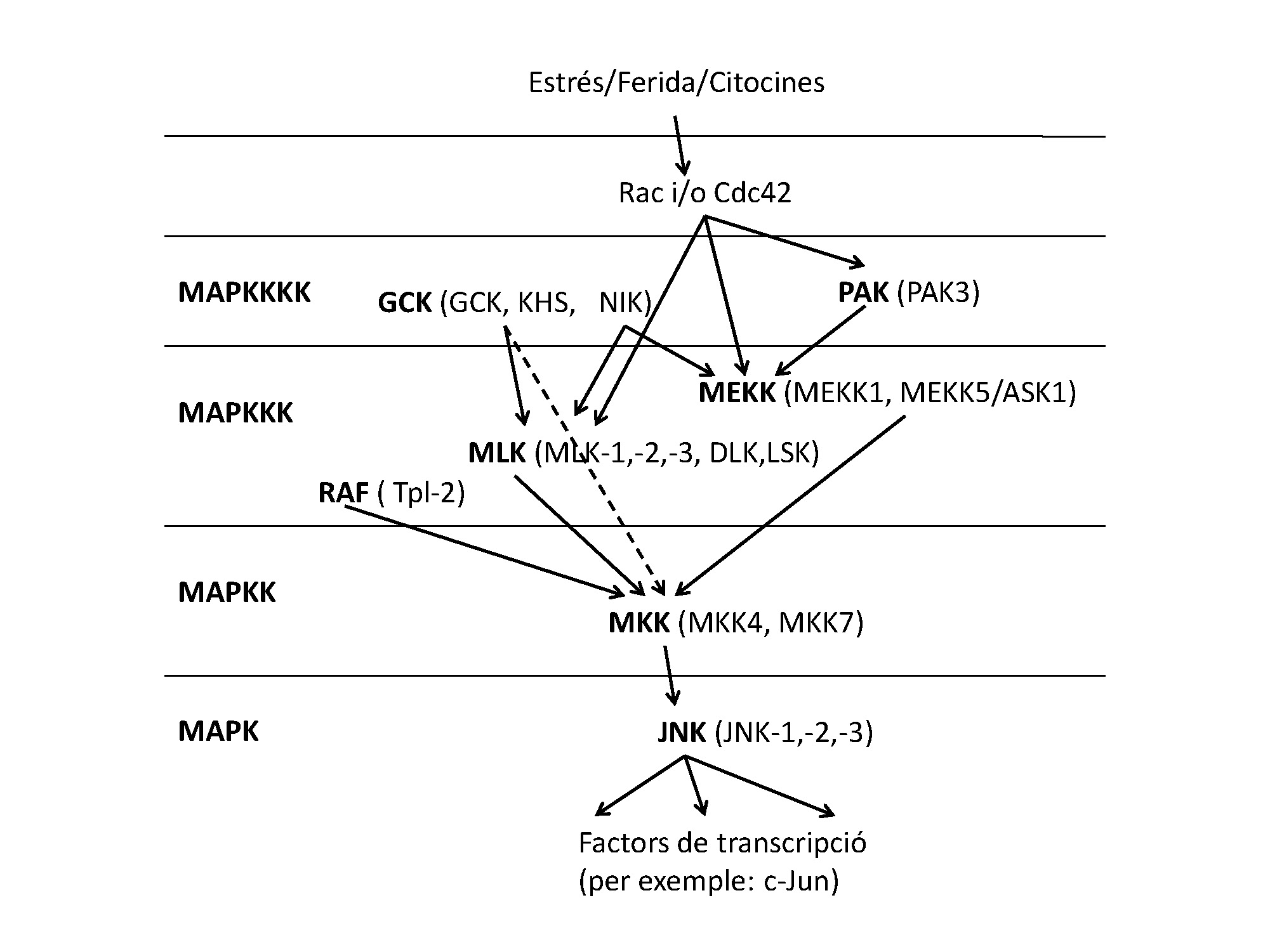 Esquema de la cascada de senyals de JNK